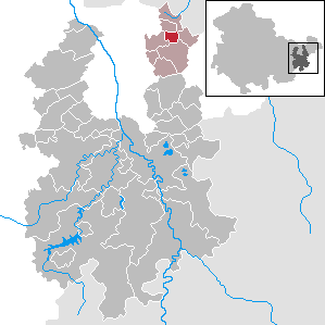 Bethenhausen in Thuringia - District Greiz